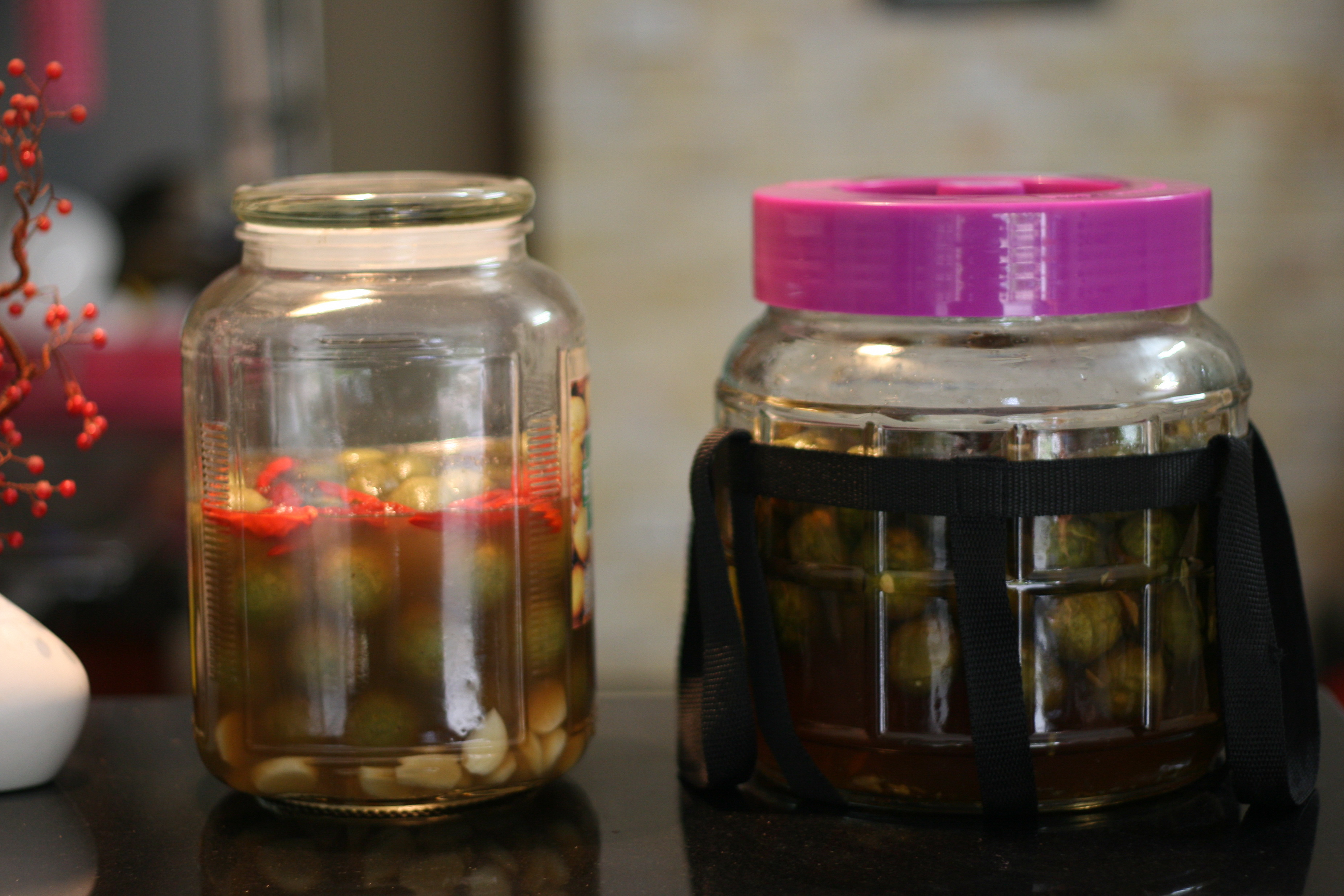 Một bình sấu ngâm nước mắm (và tỏi, ớt) bên cạnh một bình sấu ngâm đường (và gừng) Người thực hiện: Khương Việt Hà